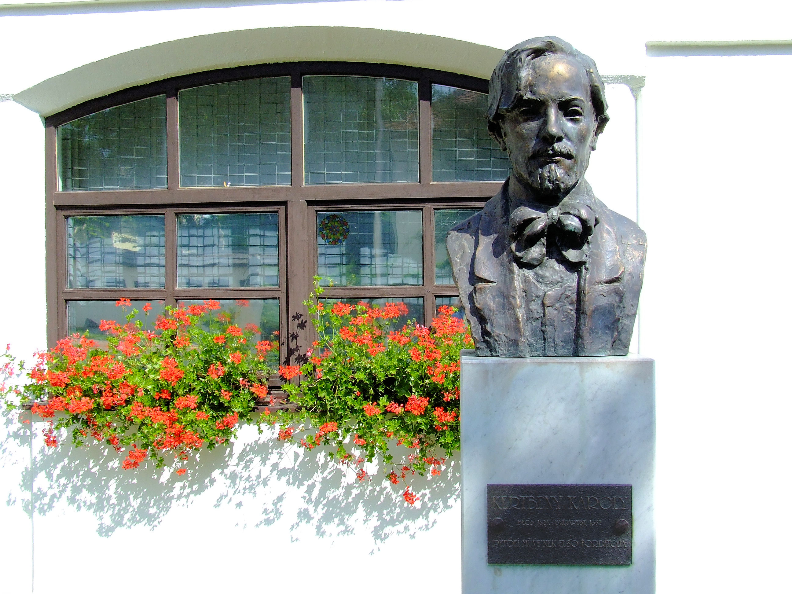 Kertbeny Károly (1824–1882) műfordító, újságíró, szobra (Felállítás 2001. december 31., Kutas László) Kiskőrösön, Petőfi Sándor fordítóinak szoborparkjában[1]